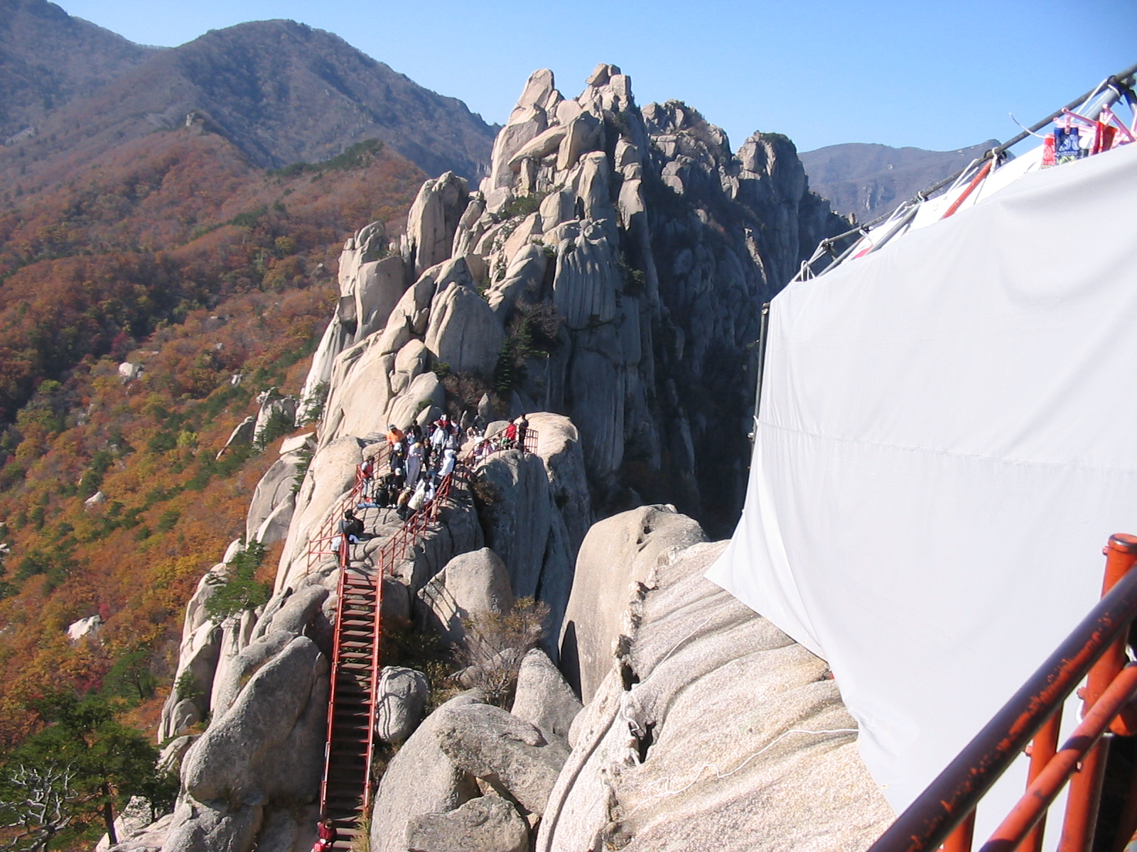 Seoraksan.